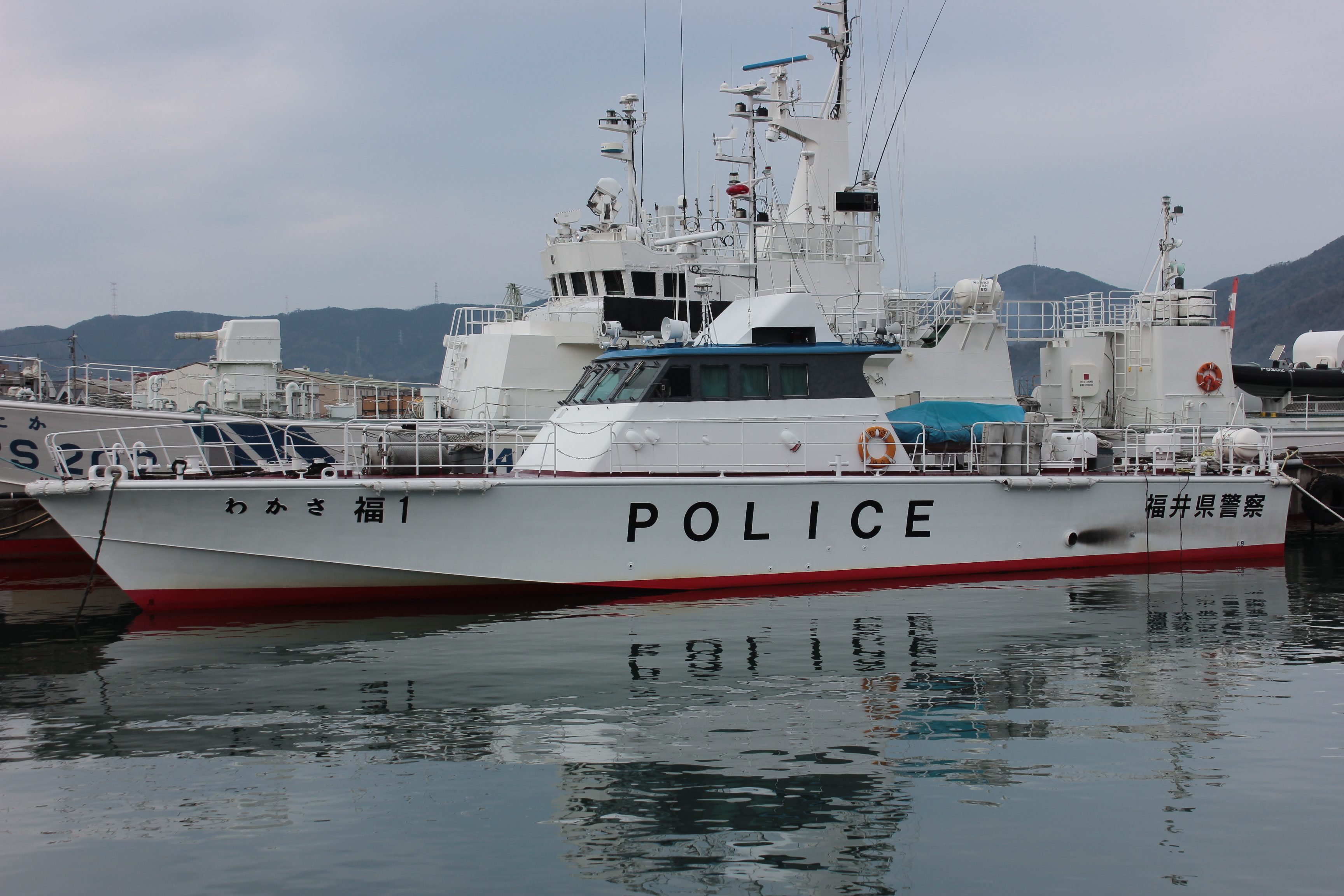 福井県警察の警察艇「わかさ」（敦賀港にて撮影） Canon EOS Kiss X5